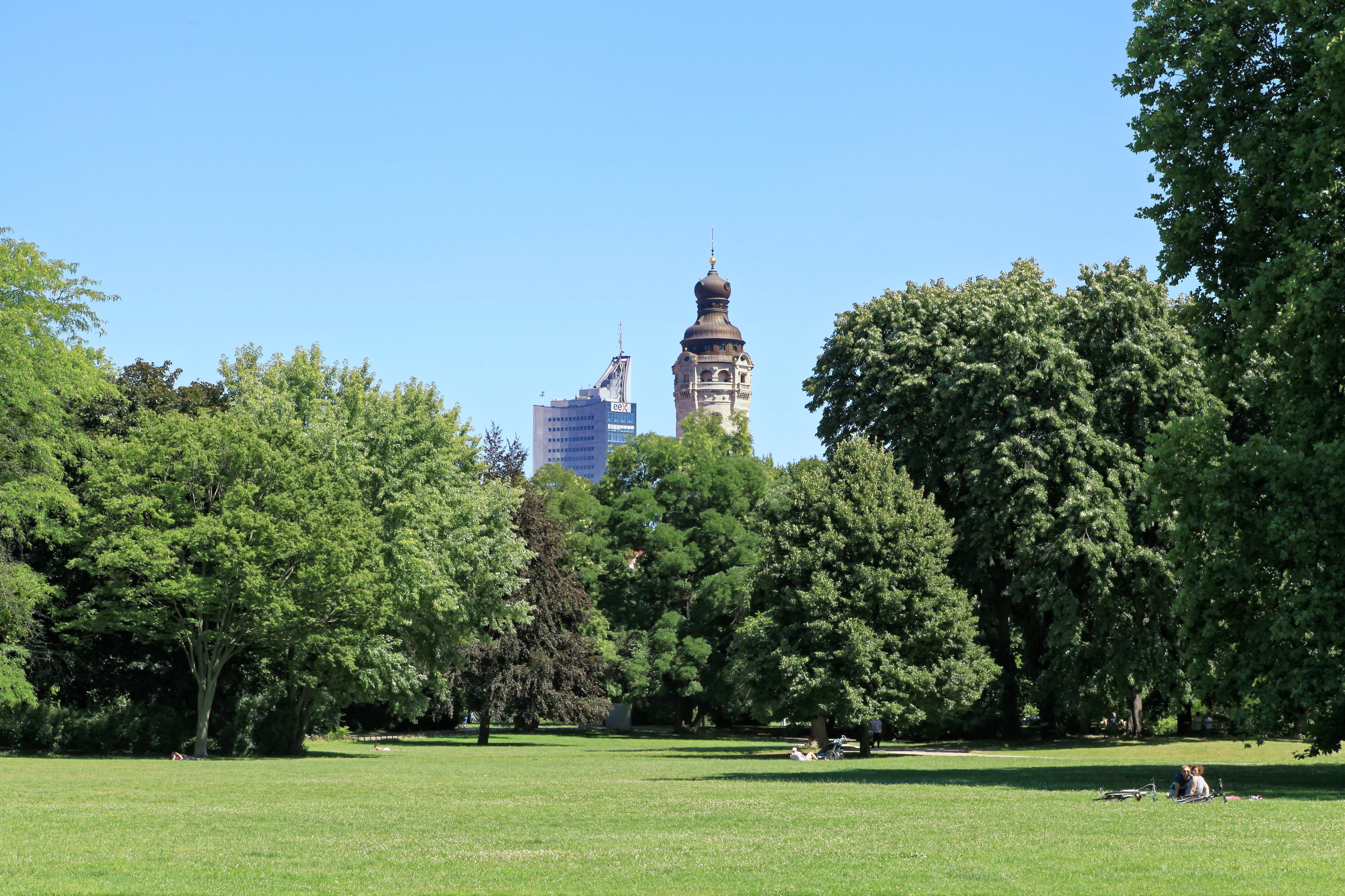 Johannapark in Leipzig